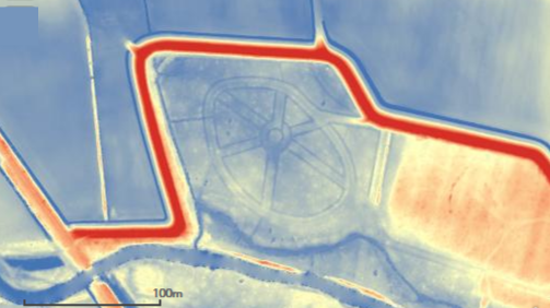 Floris I van Pallandt